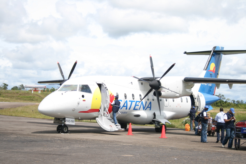 Satena en Quibdó